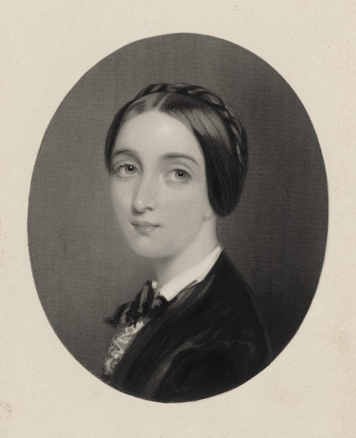 Madame Doche (estampe)